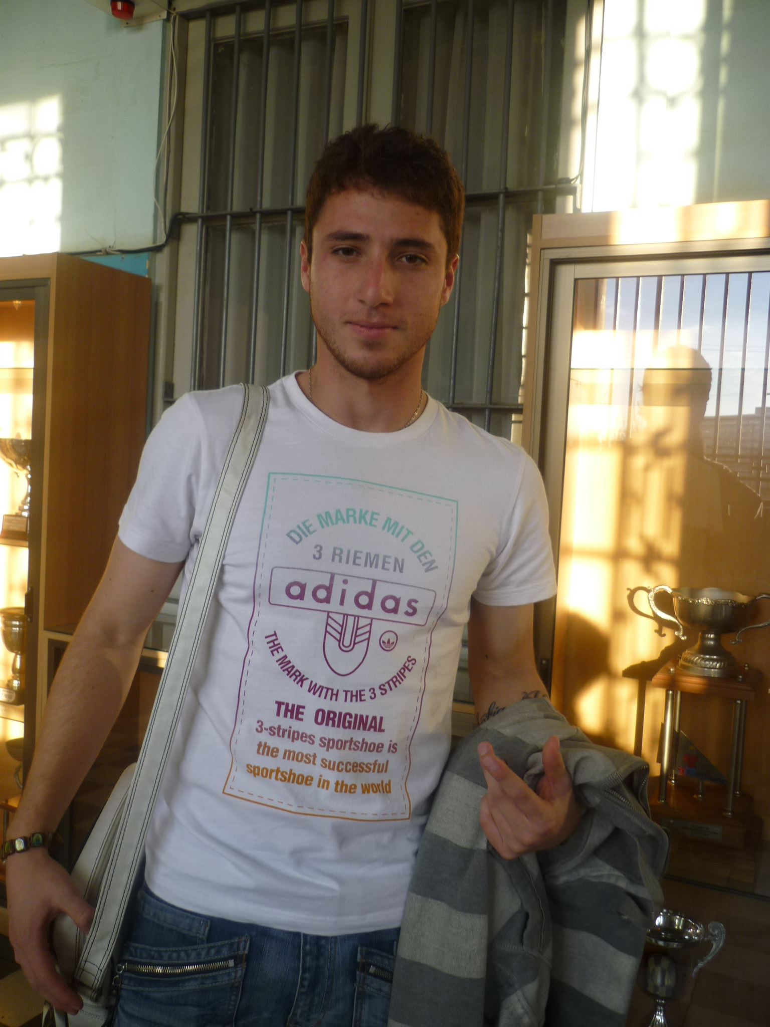 Fotografía de Agustín Parra, jugador del Santiago Wanderers de Valparaíso y de la selección chilena campeona en el Torneo Esperanzas de Toulon 2009.